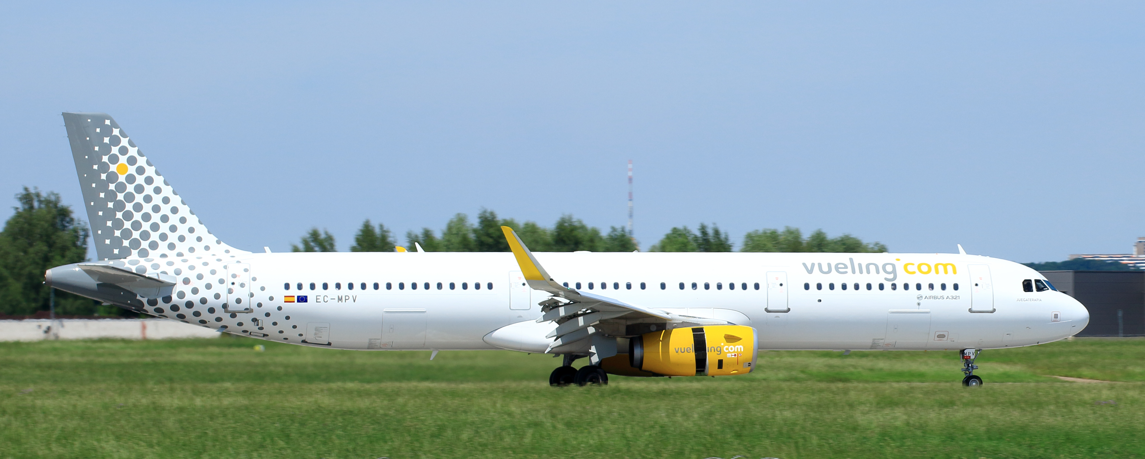 "Juegaterapia"